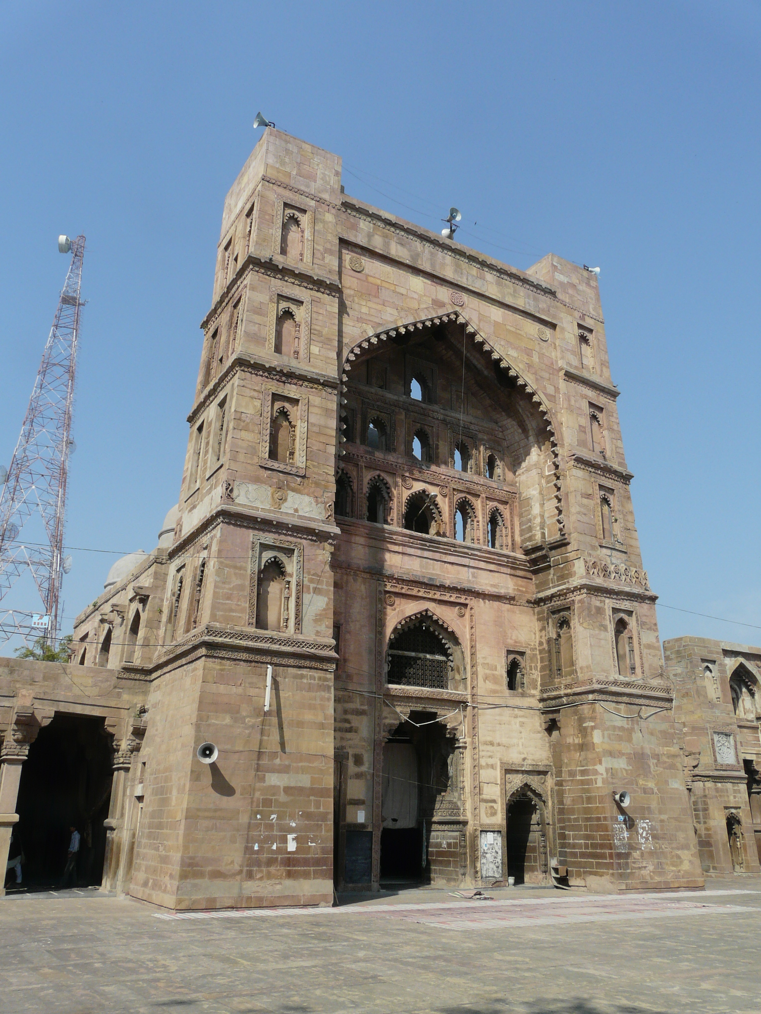 Central pishtaq, Atala Masjid, Jaunpur.